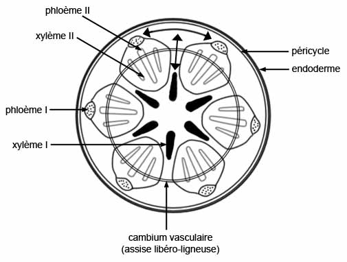 Schéma du cylindre central d'une racine : structure secondaire.